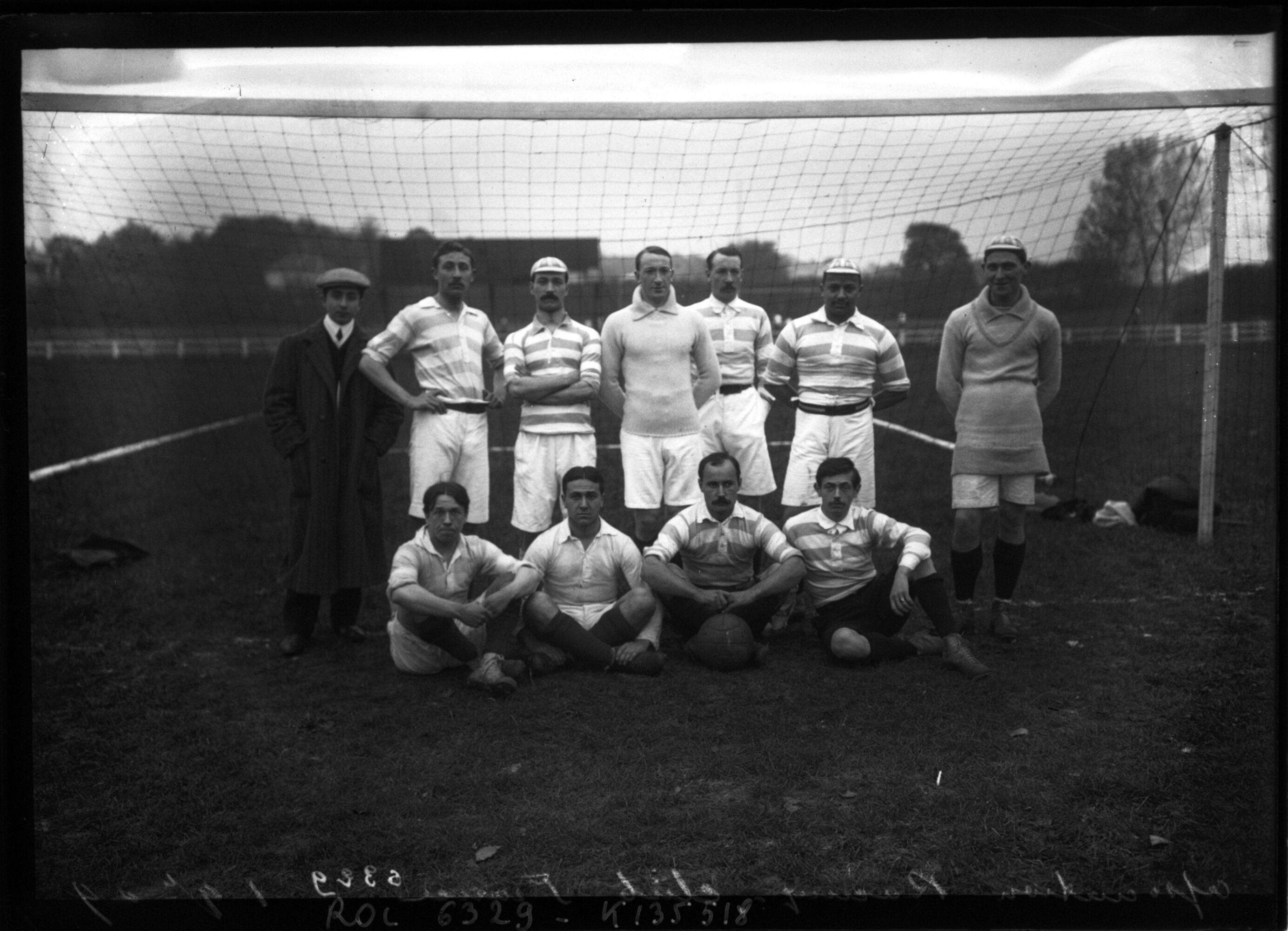 Photo de l'équipe du RC France en 1909.